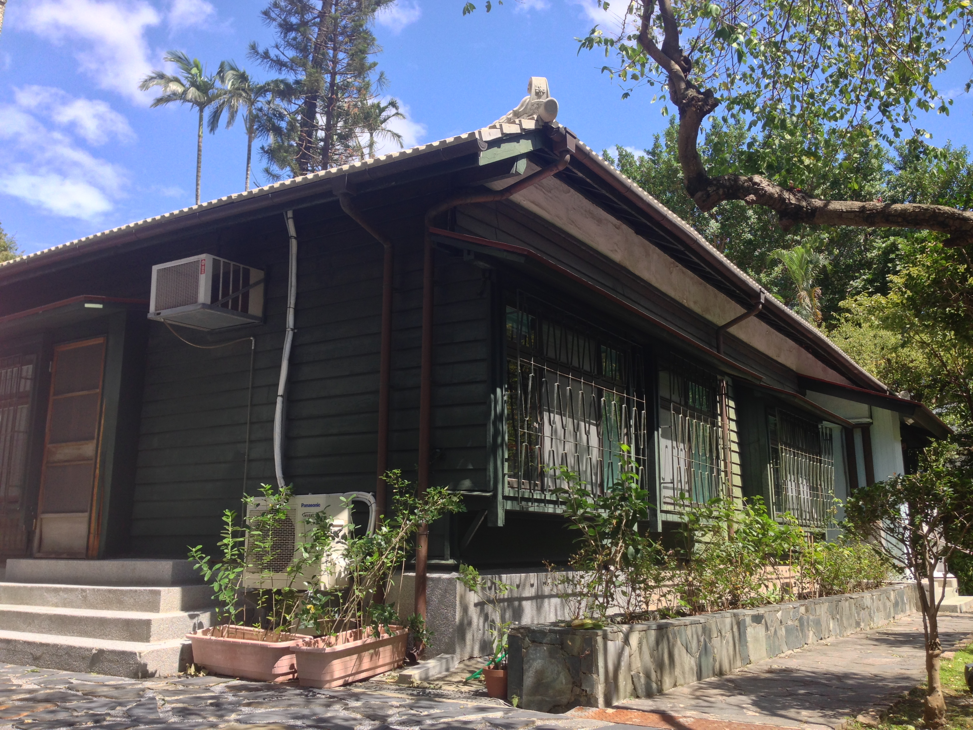 中文（台灣）: 李國鼎故居